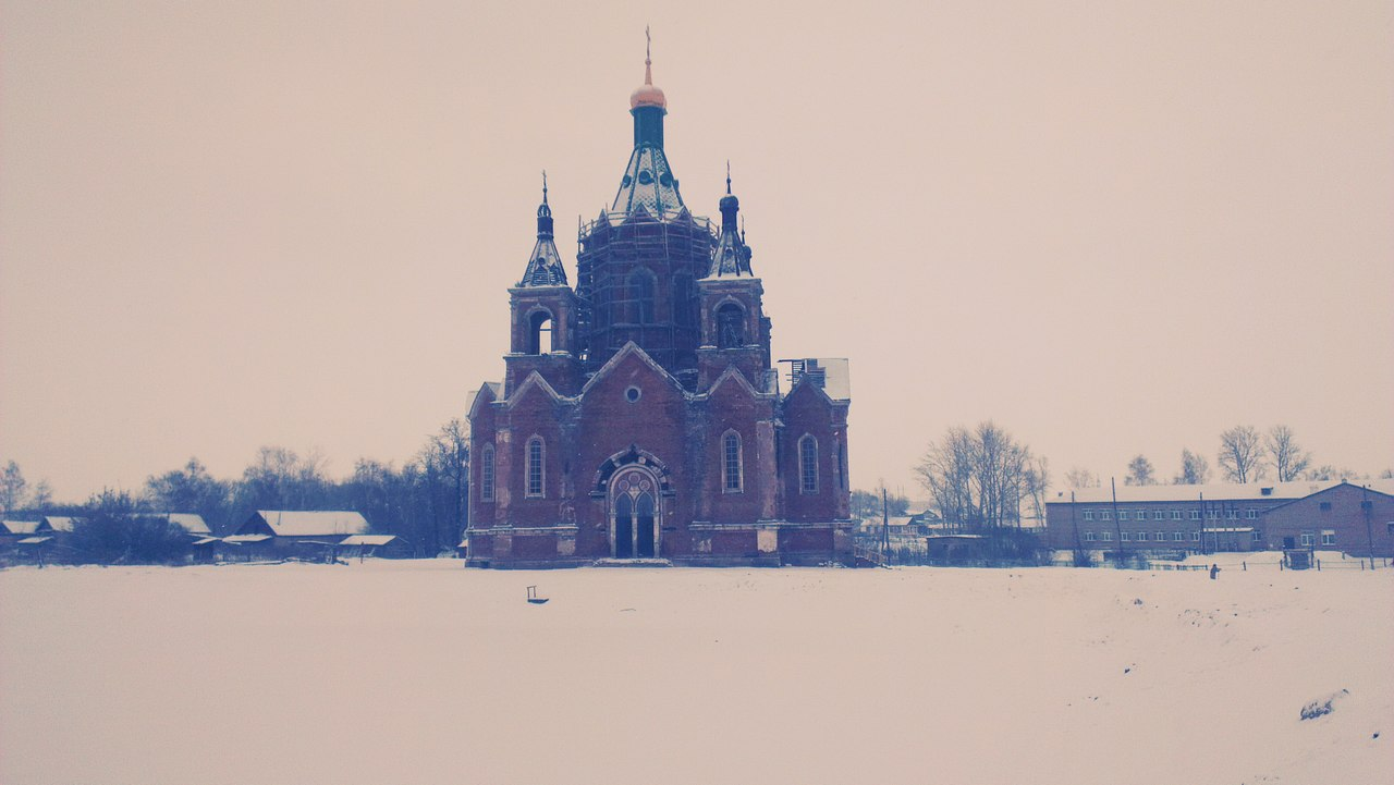 Церковь